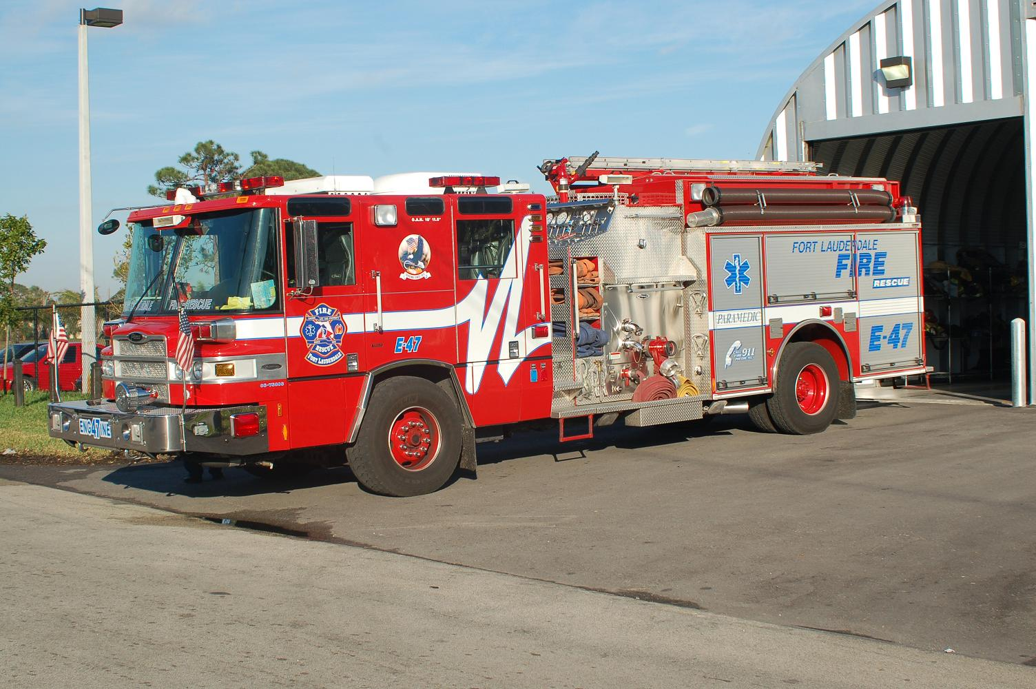 FLFR Engine 47